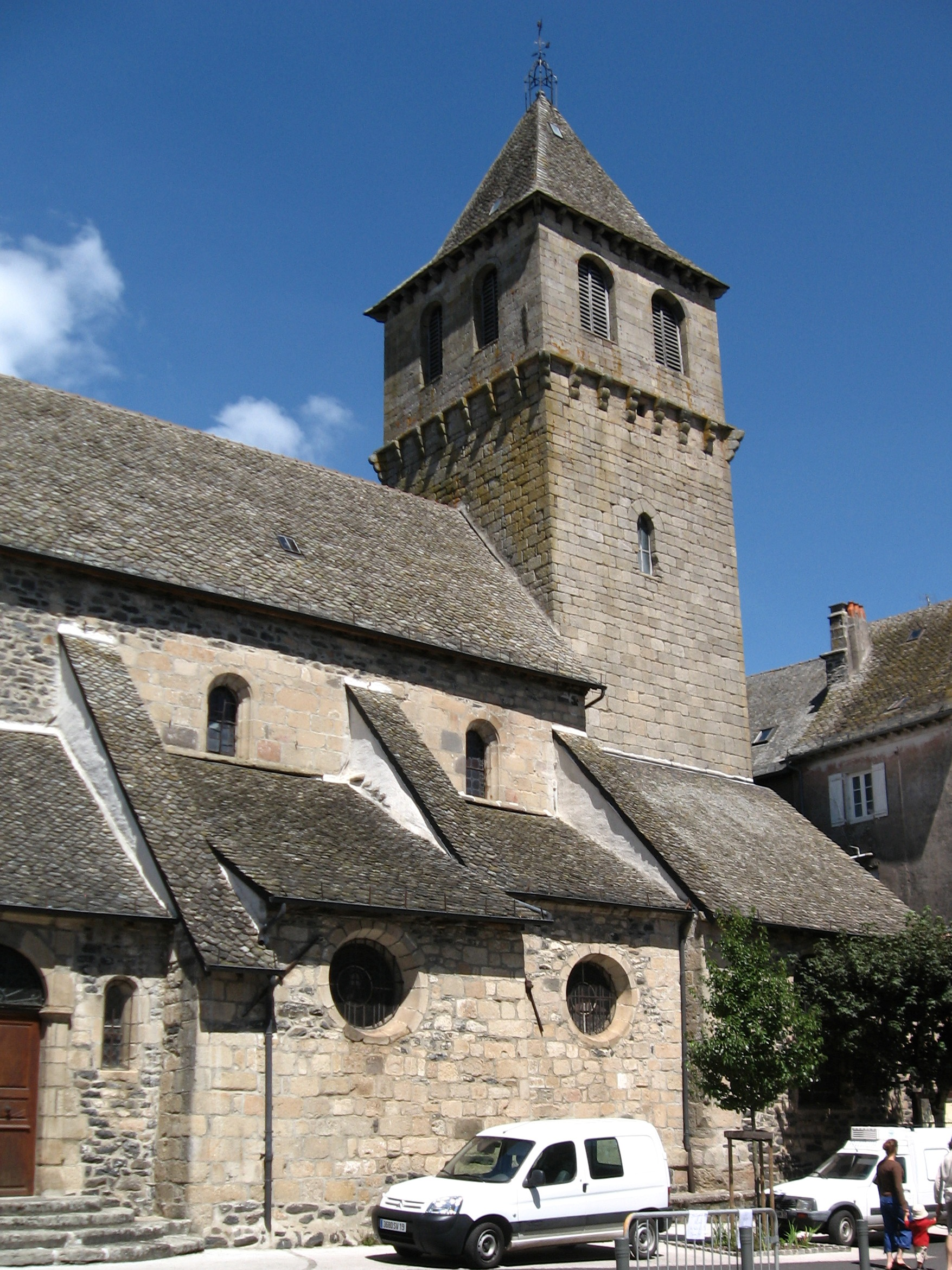 Église de Pleaux .